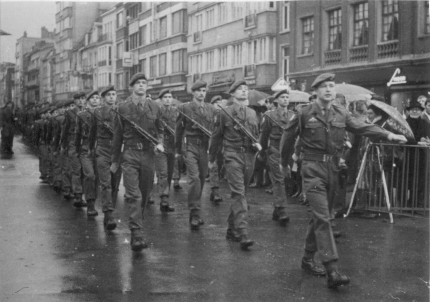 Défilé du 3Para à Kortrijk après remise des bérets lie-de-vin en 1971 Photo appartenant à l'auteur (Utilisateur:Fistos) Description : défilé de para-commandos Auteur de l'image : Fistos Licence : domaine public